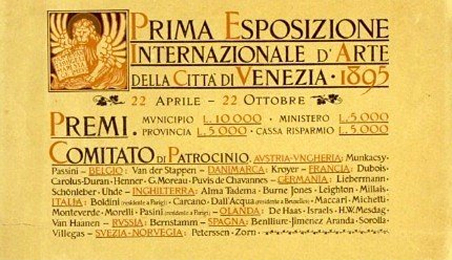 Manifesto della Prima Esposizione Internazionale d'Arte della Città di Venezia - 1895, Italia.